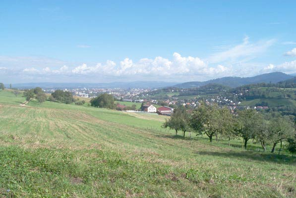 Au im Breisgau. Blick nach Freiburg. Eigene Aufnahme, freigegeben nach GNU-FDL